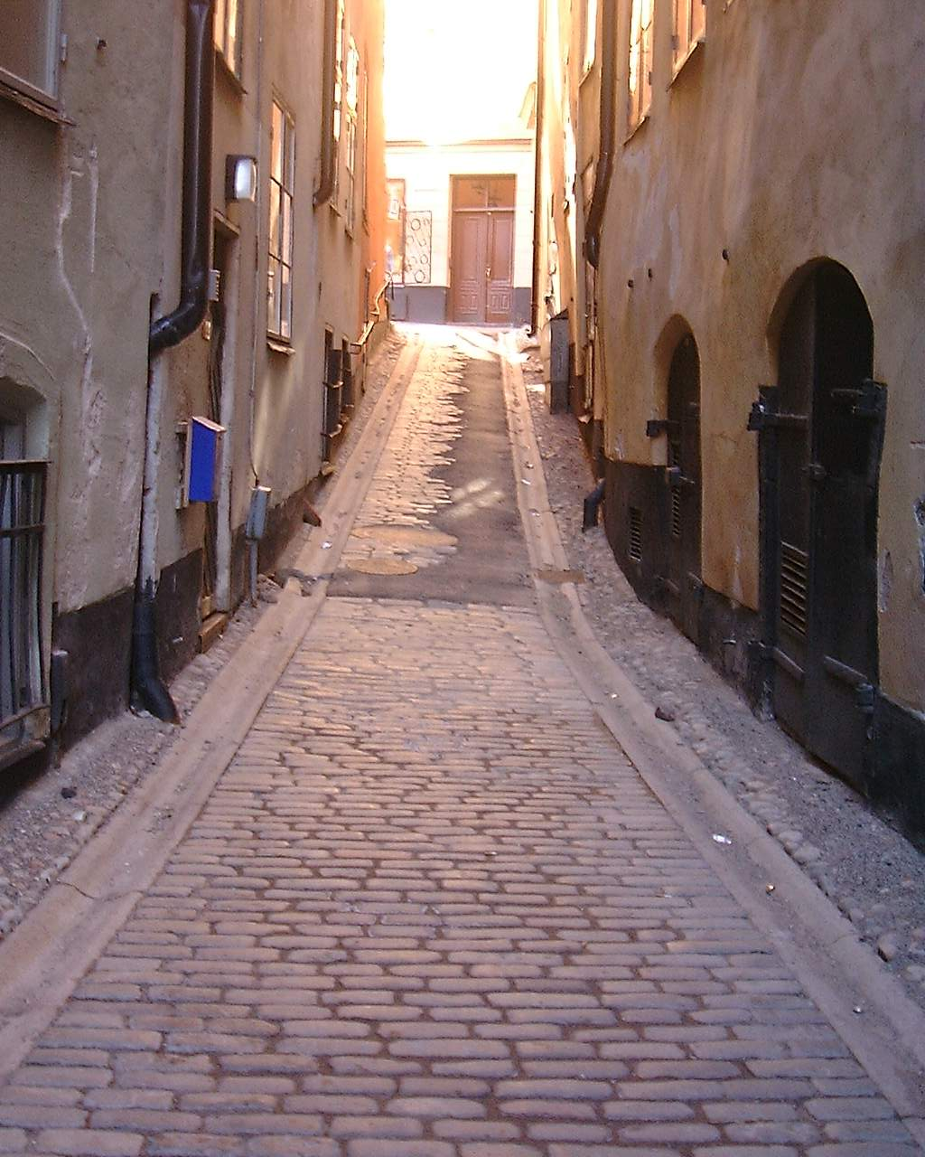 Paving at Kråkgränd, Gamla stan, Stockholm.